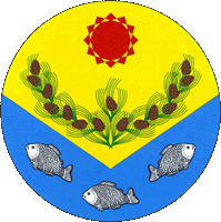 Герб Халбакинского наслега, Республика Саха (Якутия)